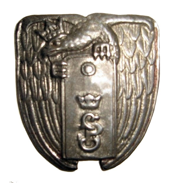 Odznaka Szkoły Podchorążych Piechoty w Komorowie k/Ostrowi Mazowieckiej wykonana z blachy "puszkowej" w Oflagu XC (koło Lubeki). własność W. K Autor zdjęcia Kerim44